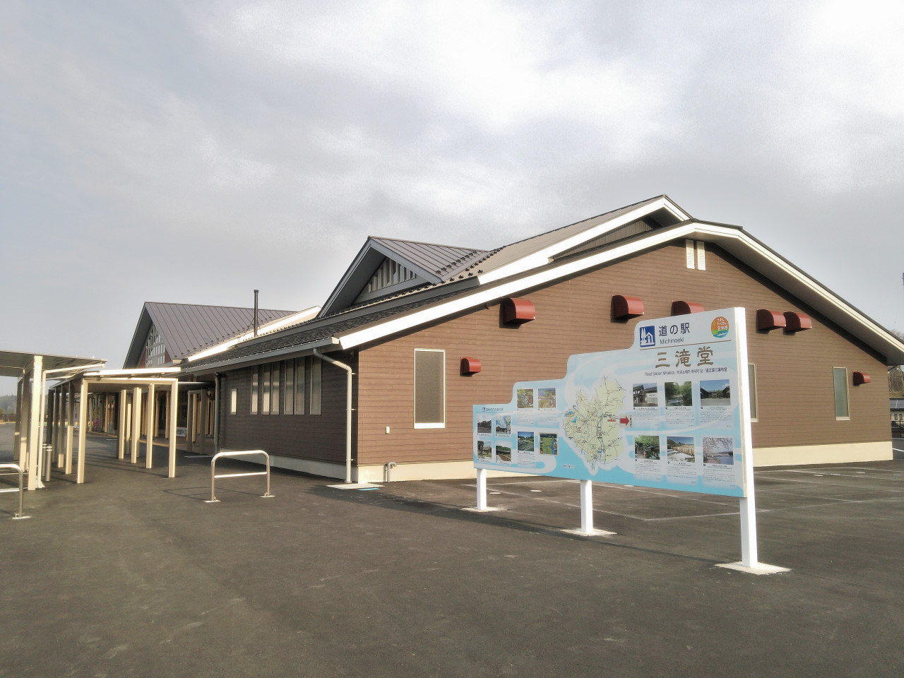 Mitakido, Roadside Station, Miyagi, Japan. 宮城県にある道の駅「道の駅三滝堂」